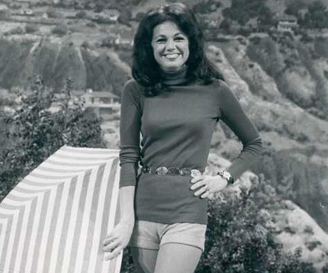 Jo Ann Pflug, Laugh In, March 13, 1972 episode.